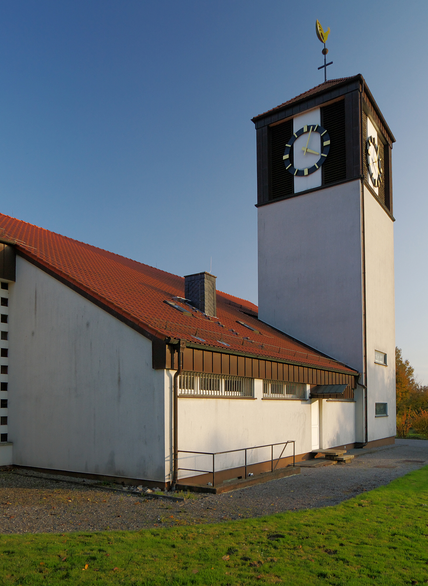 Katholische Kirche St. Konrad in Fröndenberg-Langschede, Nordrhein-Westfalen, Deutschland.